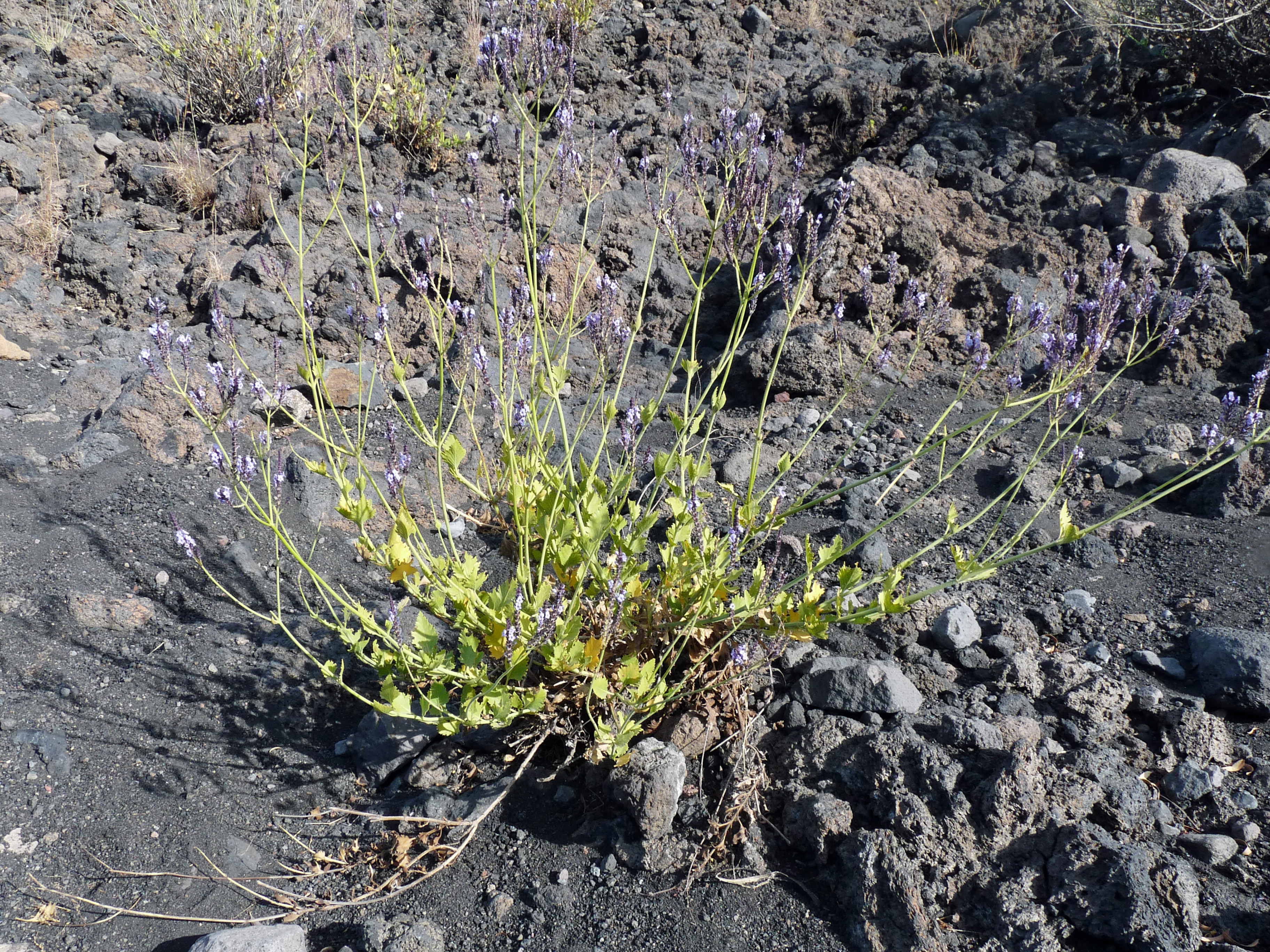 Chã das Caldeiras (île de Fogo, Cap-Vert) : Lavandula rotundifolia, espèce endémique